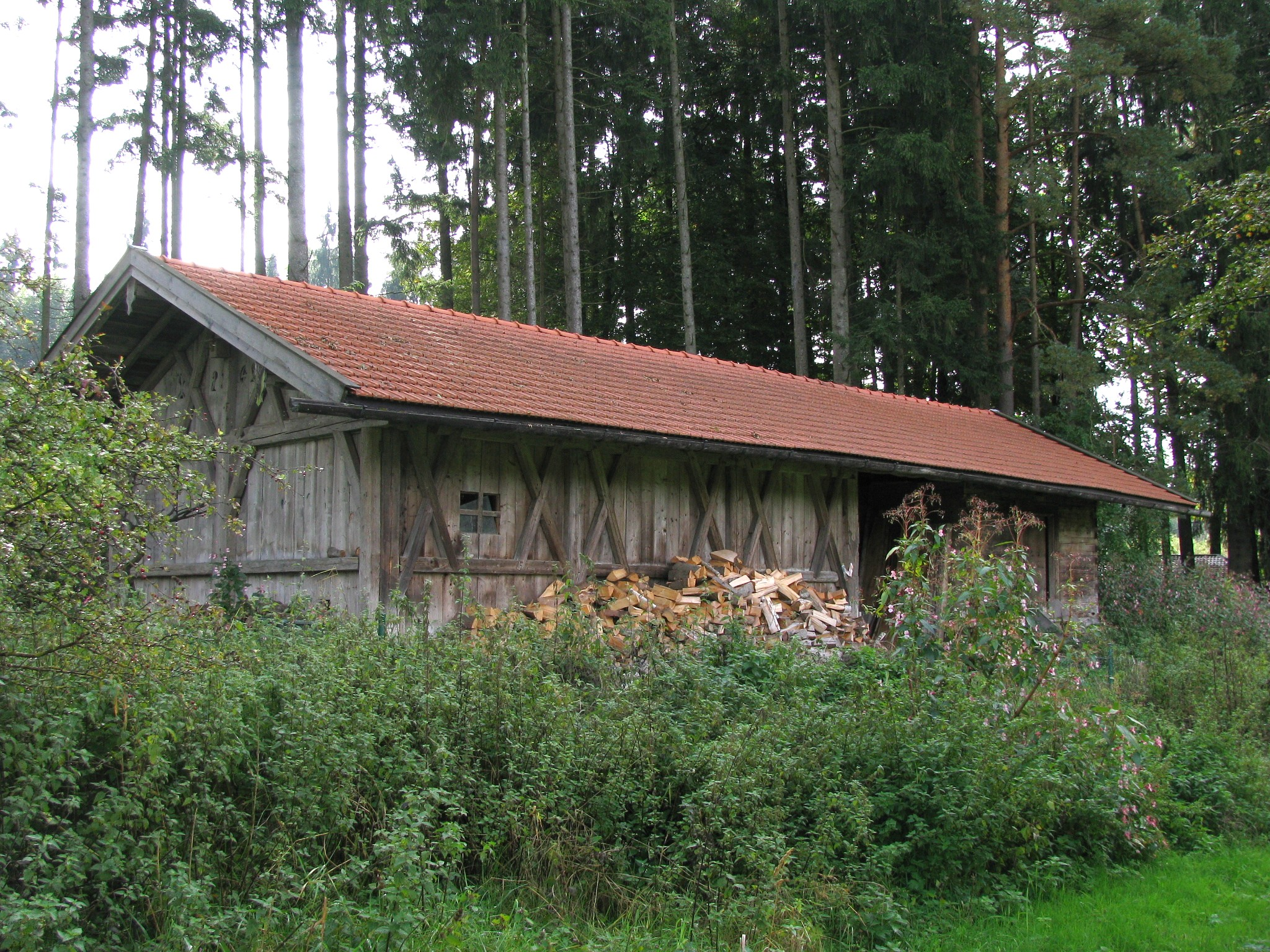 Wieder aufgestellter Bundwerkstadel, bez. 1748, mit eingebautem Getreidekasten, 18. Jh.; nördlich außerhalb von Moosham in der Gemeinde Egling, Bayern